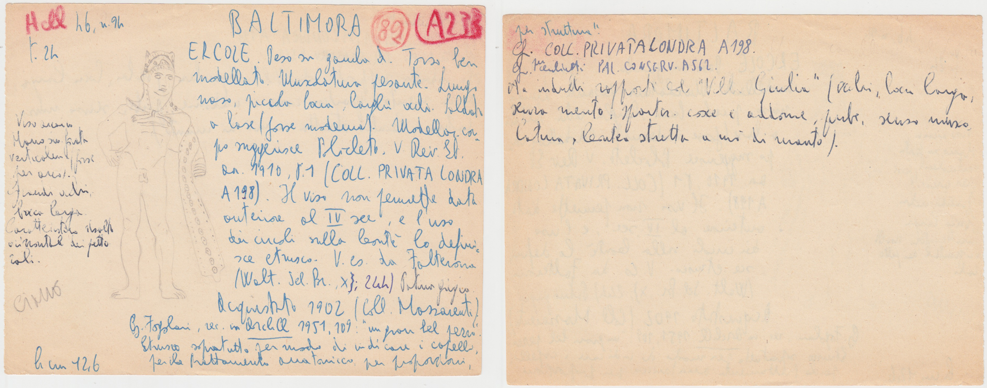 Esempio Cards Colonna